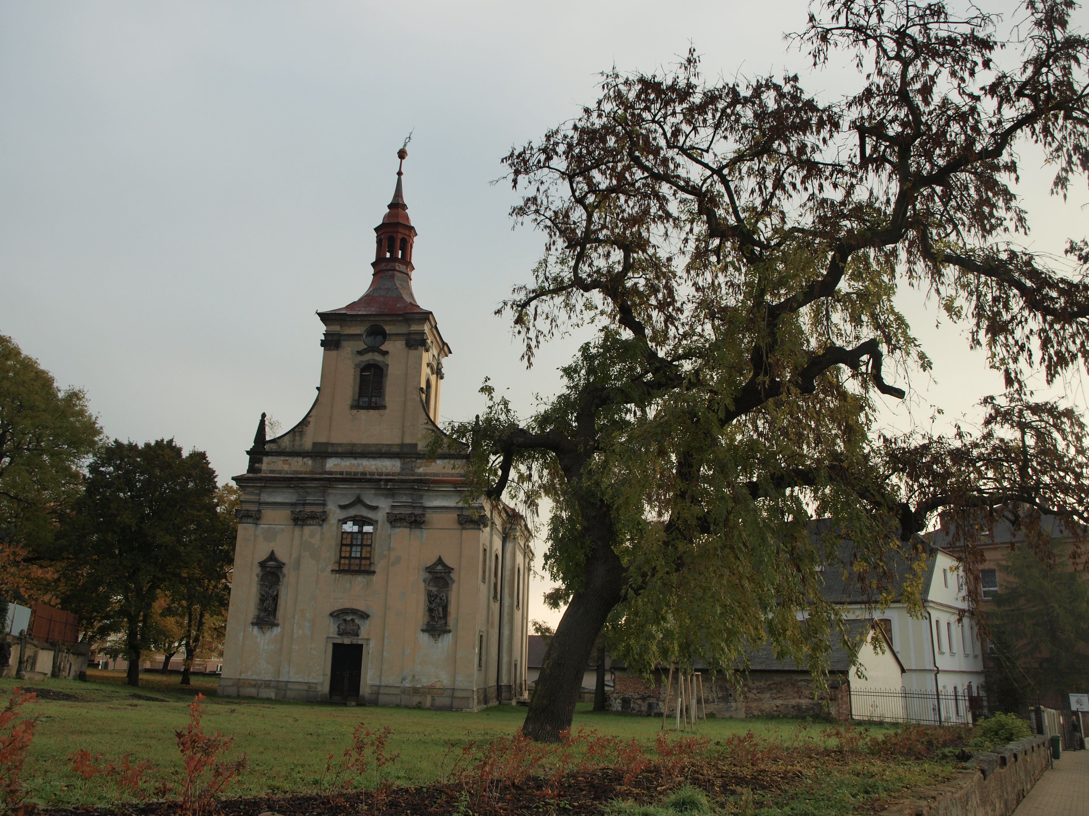 Kostel svatých Petra a Pavla, Karla Havlíčka Borovského, Osek